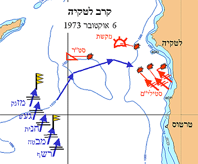 תרשים קרב לטקיה 6 באוקטובר 1973